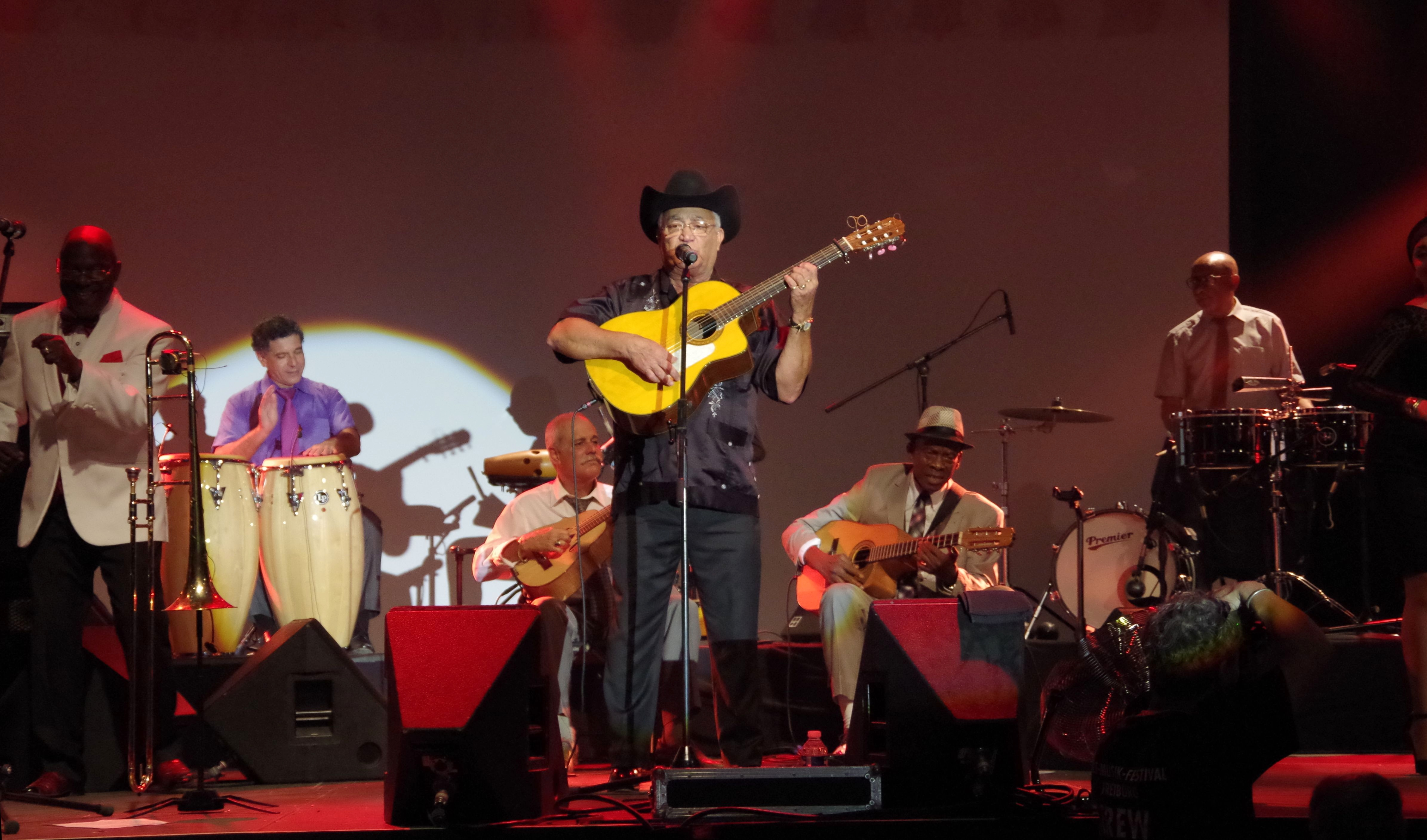 Das Zelt-Musik-Festival 2015 in Freiburg im Breisgau. 06.07.2015 Orquesta Buena Vista Social Club Eliades Ochoa